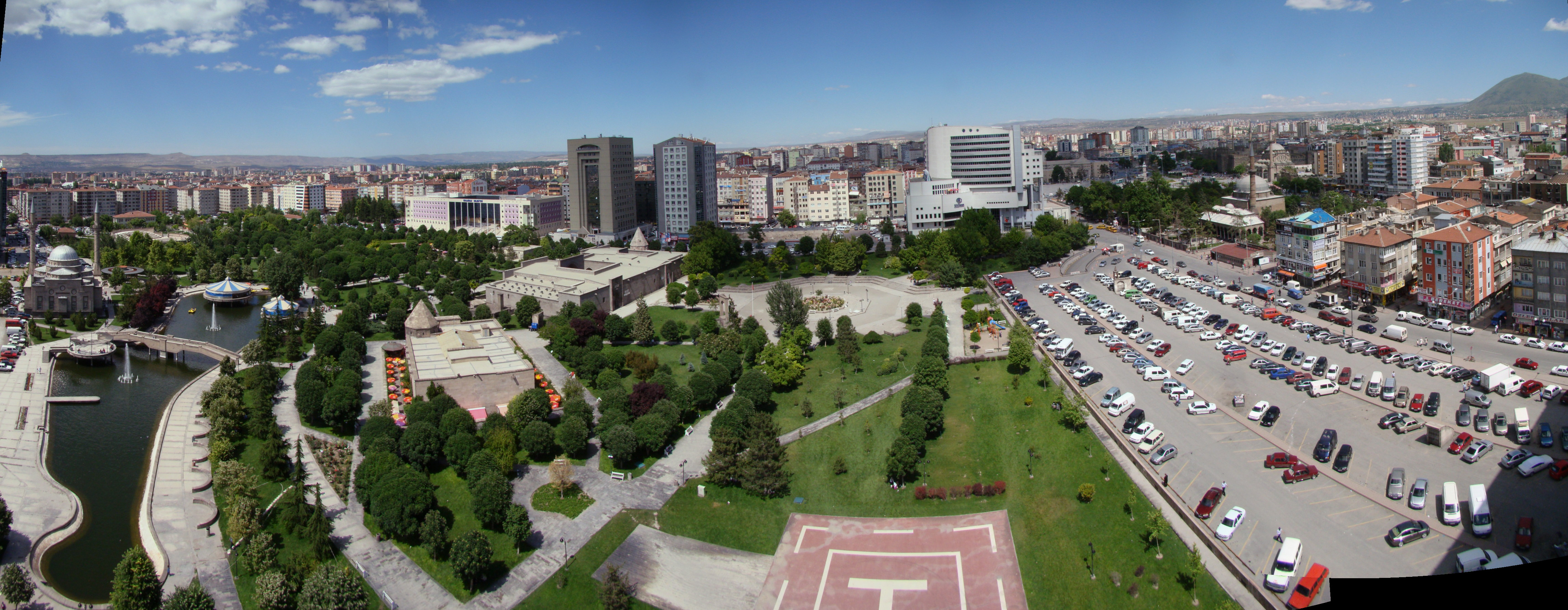 Kayseri panorama, Turkey